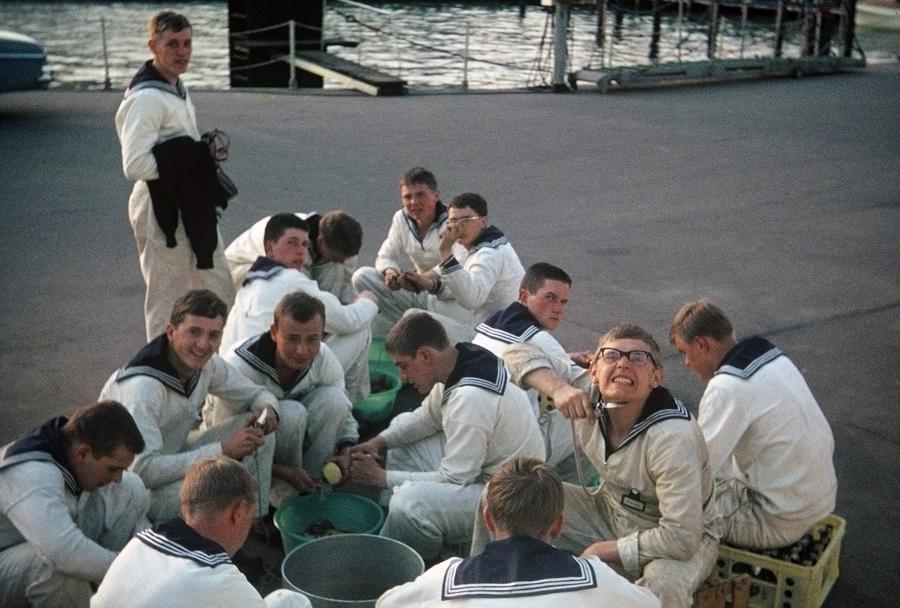 Fotografie von Offizieranwärtern der Gorch Fock (1958) beim Kartoffelschälen (Potackendrehen) auf der Blücherbrücke in Kiel